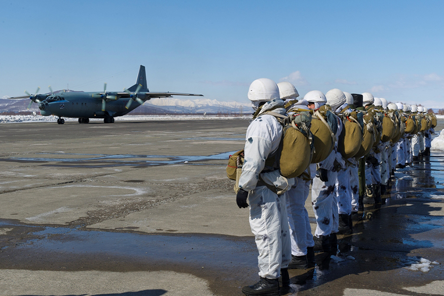 Выполнение учебно-тренировочных прыжков с парашютом десантно-штурмовых подразделений 40-й отдельной бригады морской пехоты Тихоокеанского флота.